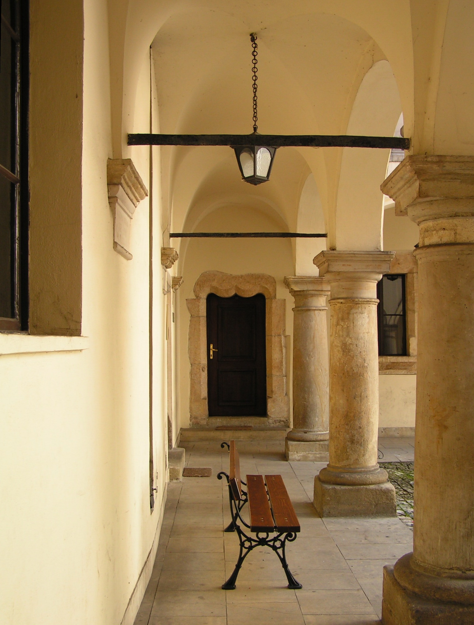 Collegium Iuridicum, Kraków